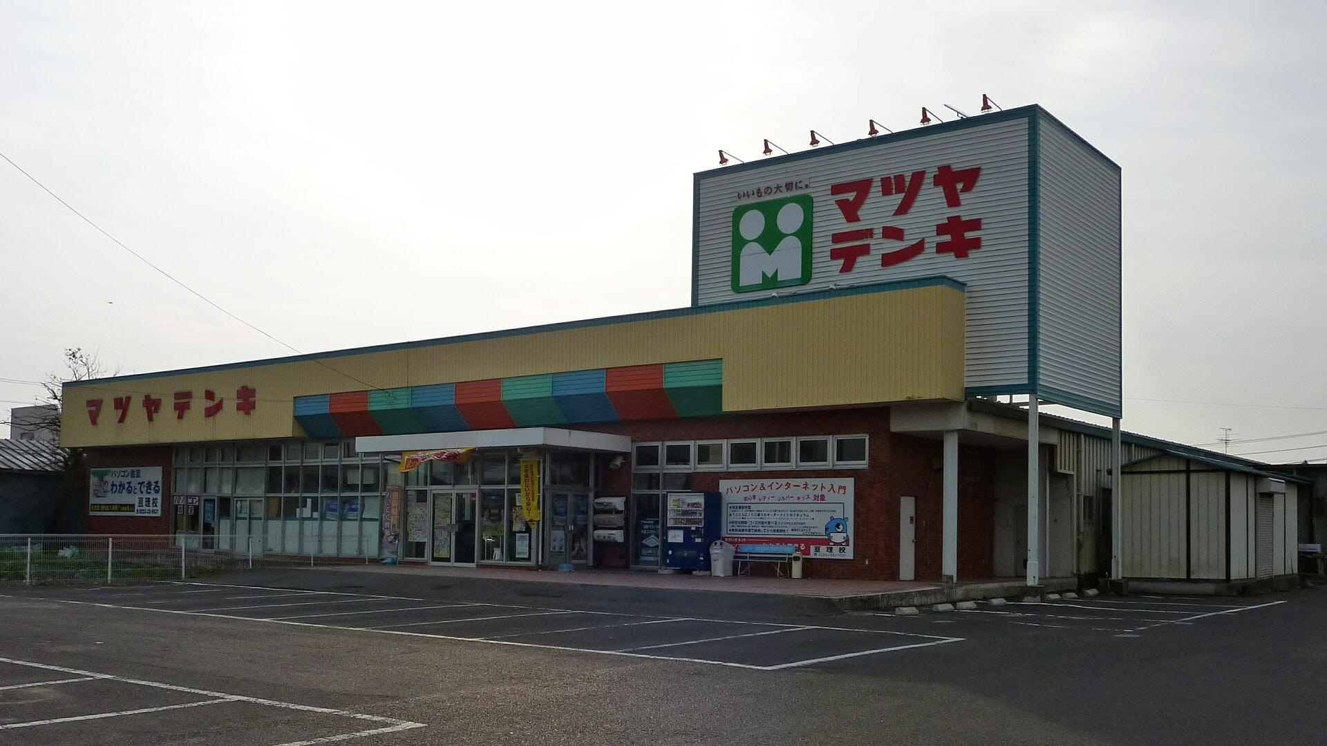 マツタデンキ亘理店